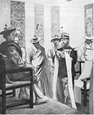 Le commandant d'Ollone offrant l’écharpe de félicité au Dalaï-Lama